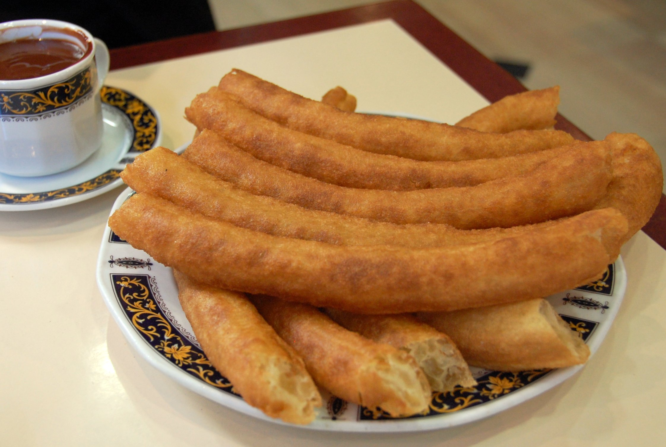 Churros (porras) y chocolate, en Granada.